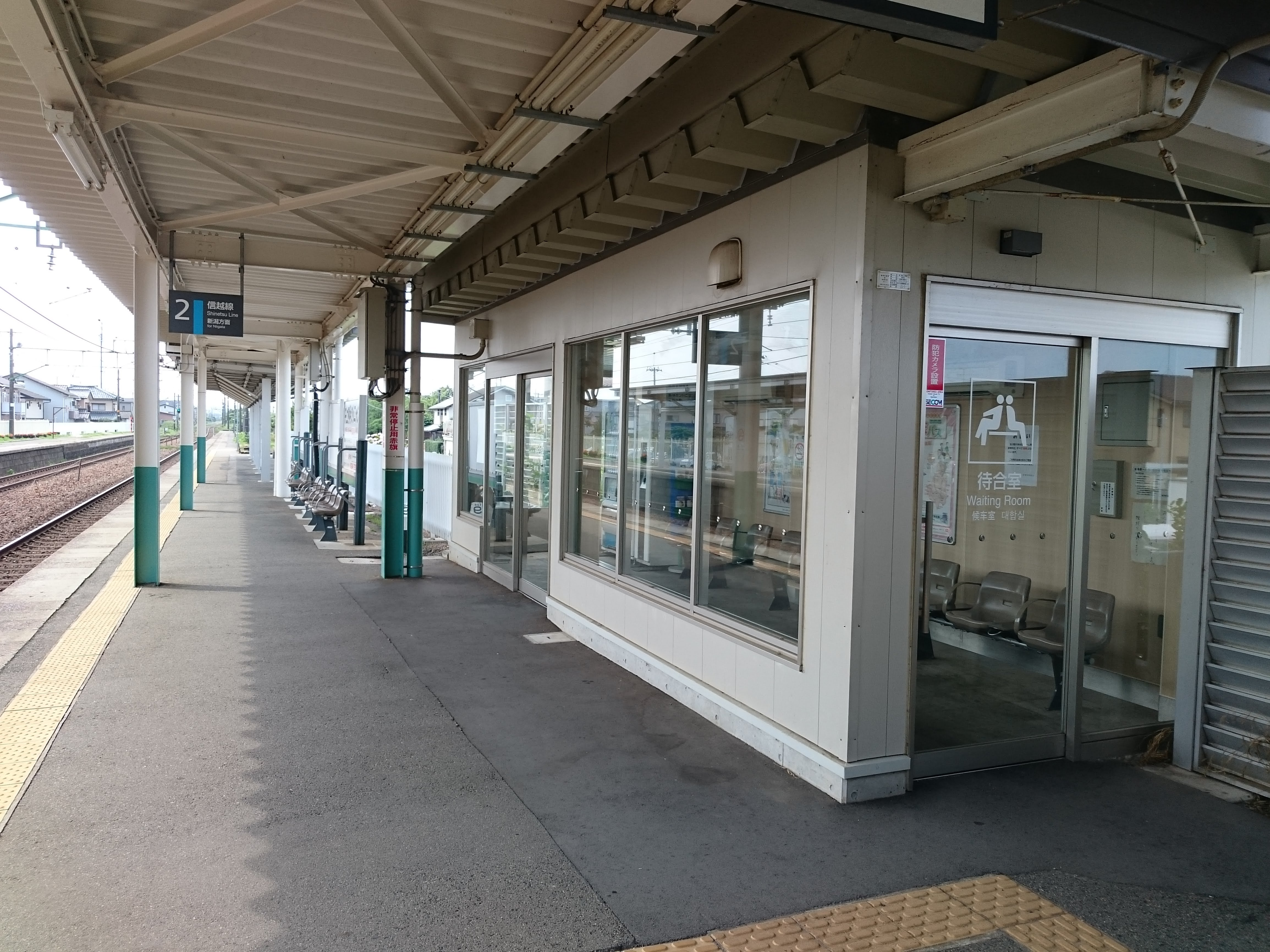 荻川駅のホーム